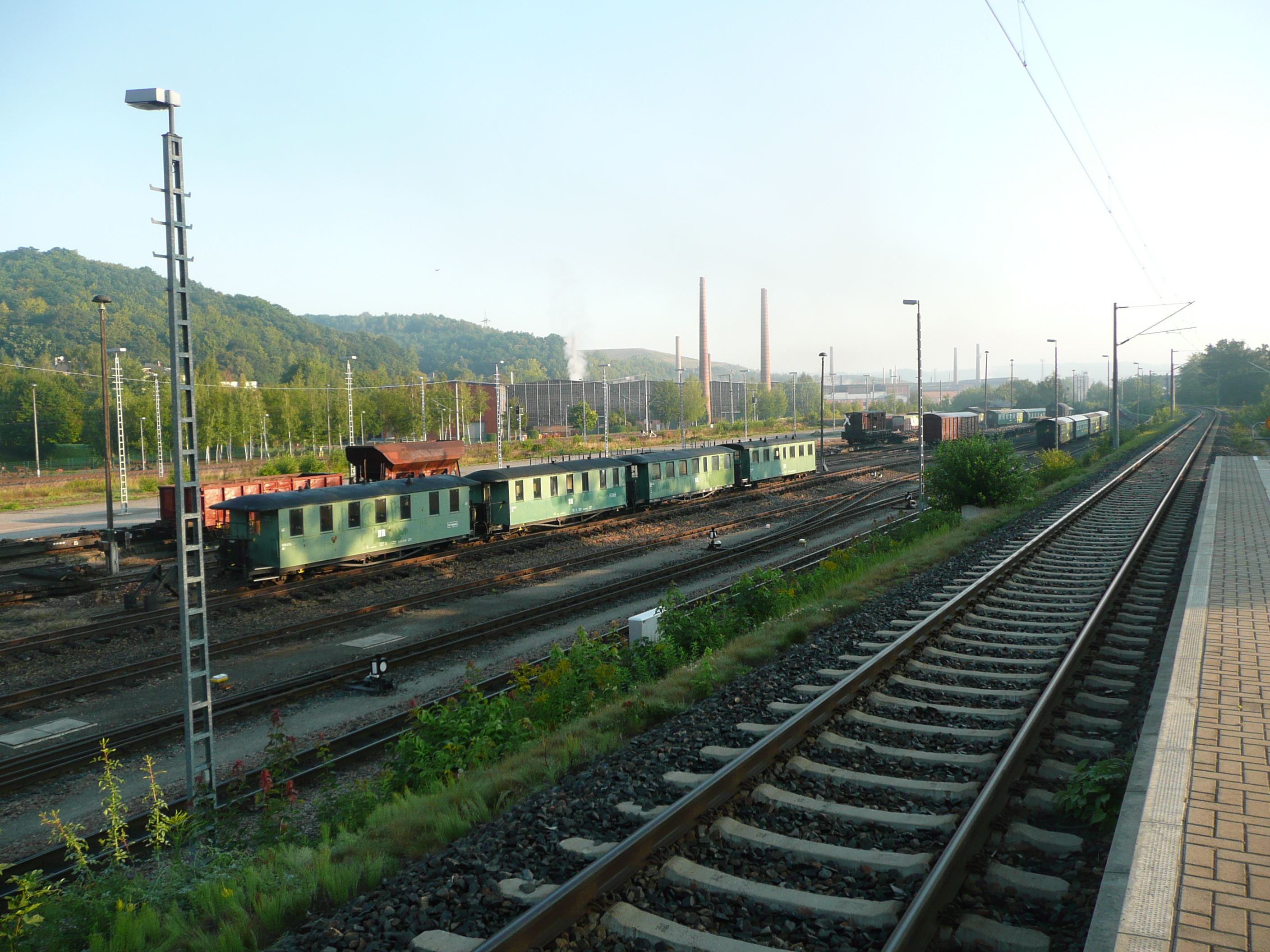 Gesamtansicht aller Gleisanlagen in Freital Hainsberg